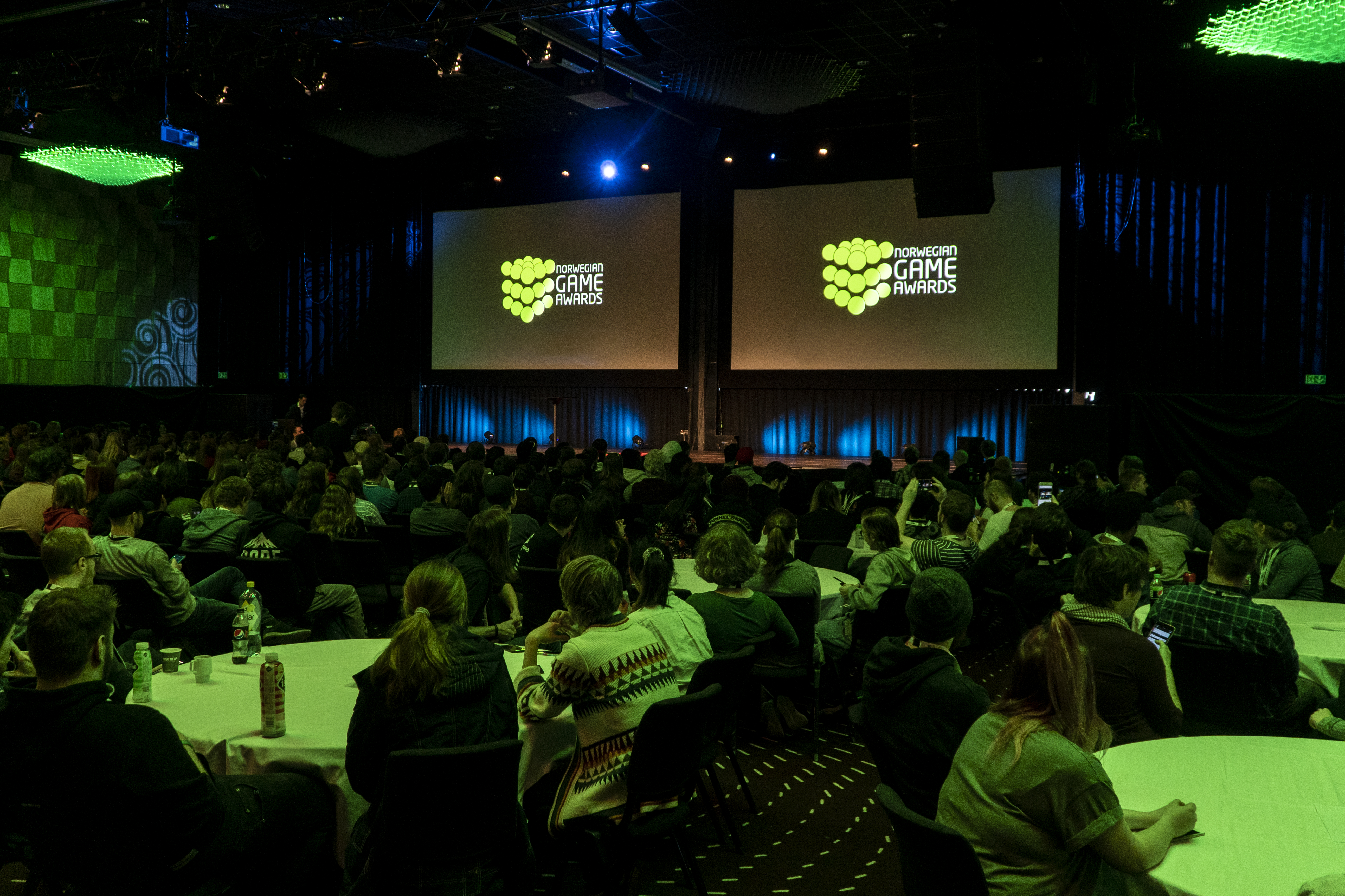 arrangement